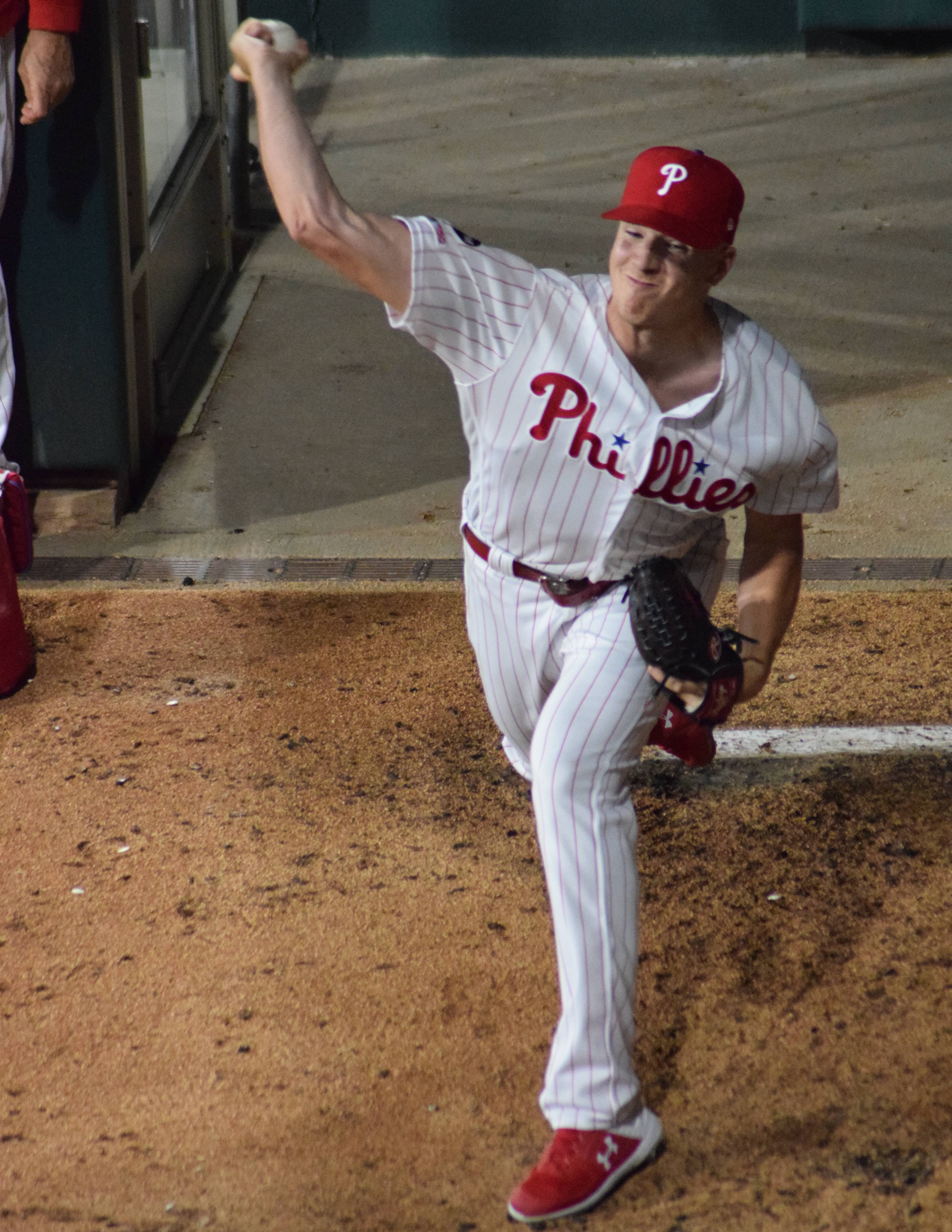 Nick Pivetta